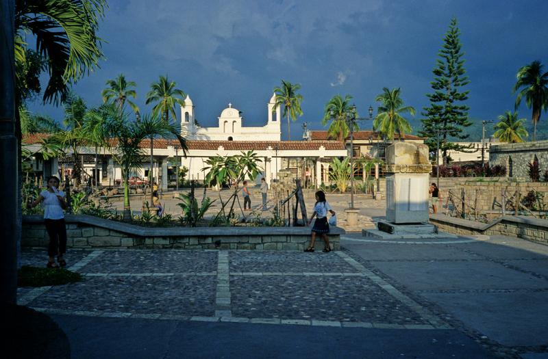 Plaza in Copan Ruinas, Honduras